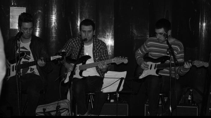 Universo Acelerado a un concert a la sala Arrikitown (Barcelona).